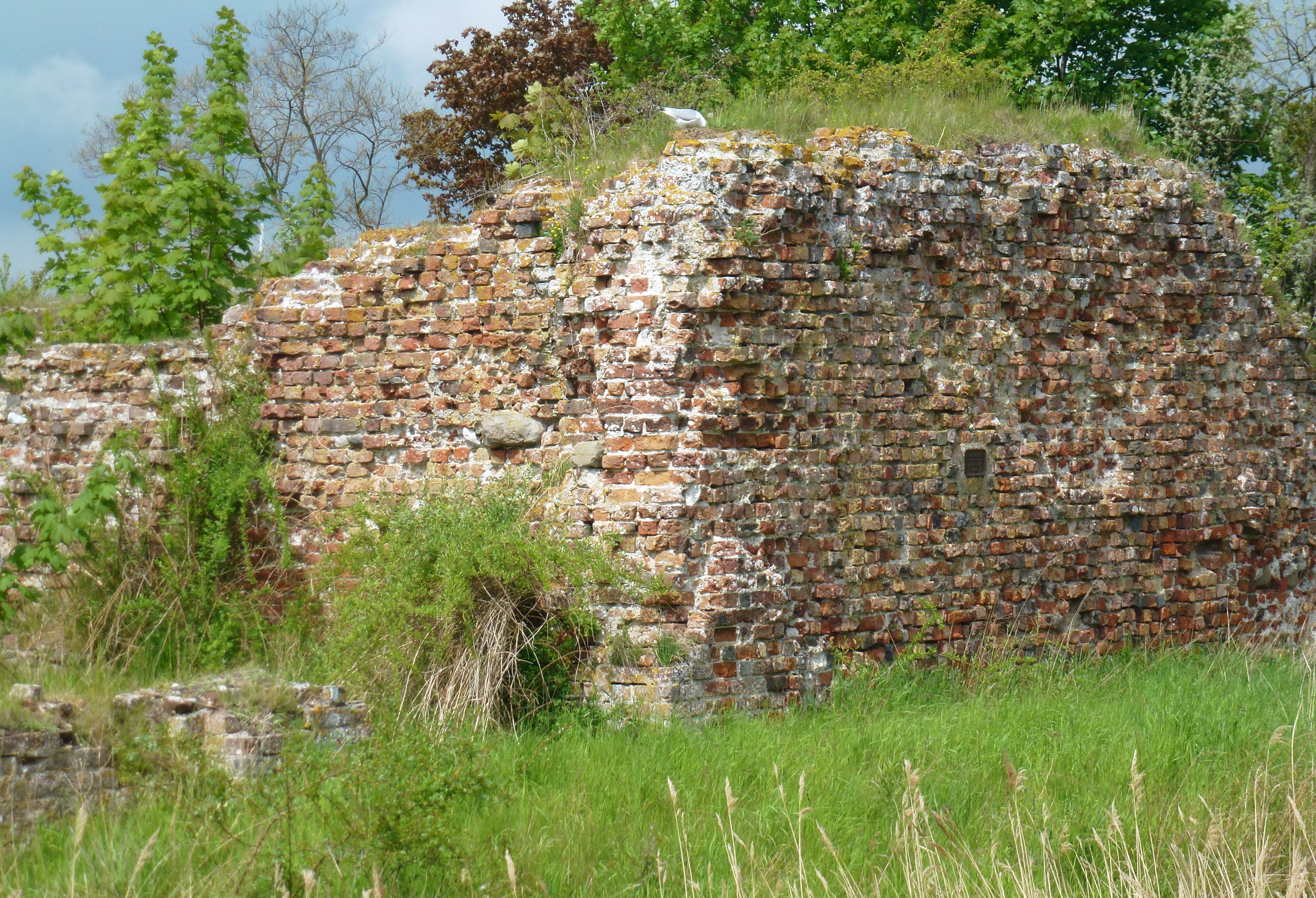 Burgruine Glambeck